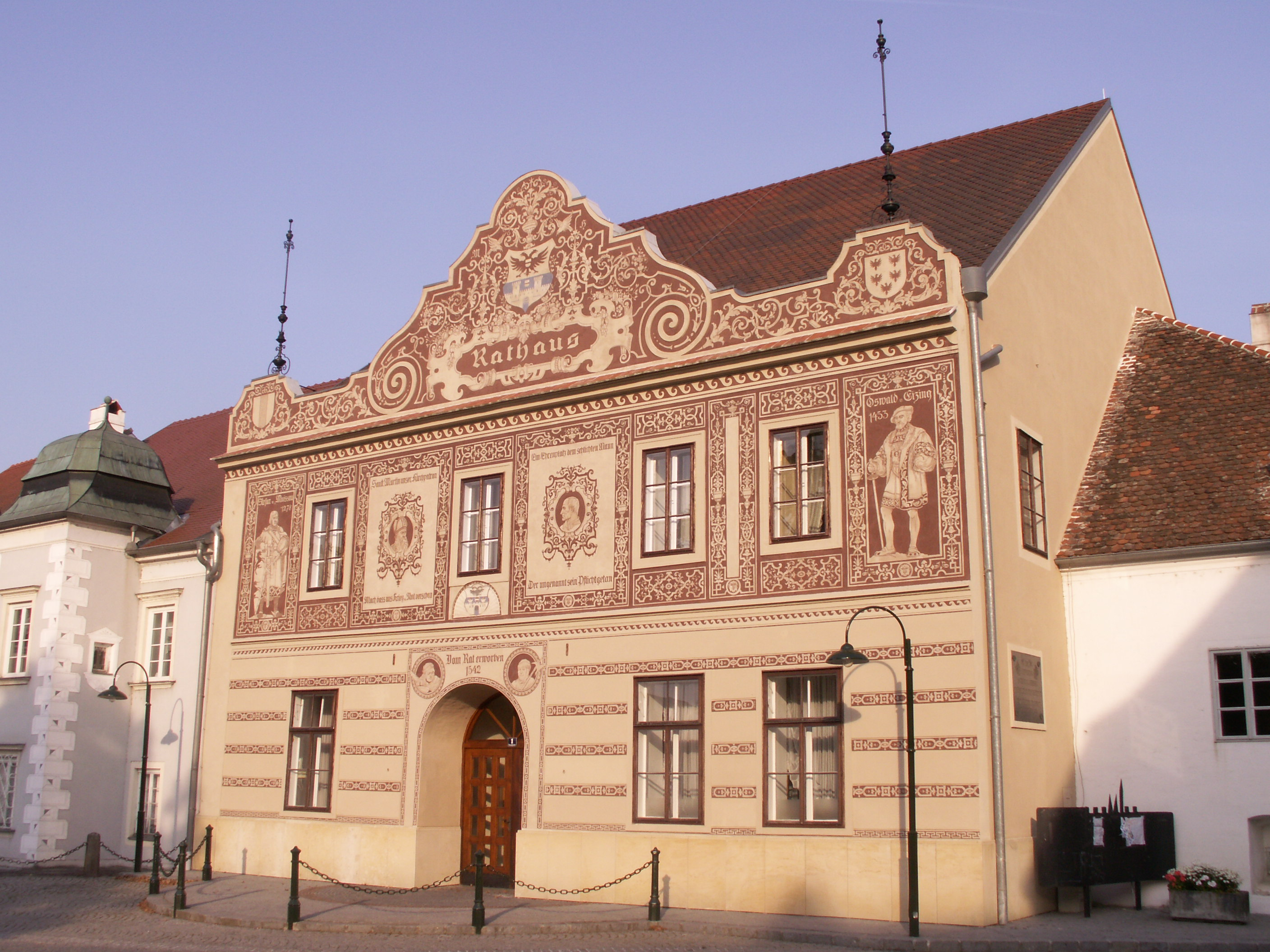 Drosendorf - budova radnice na hlavním náměstí